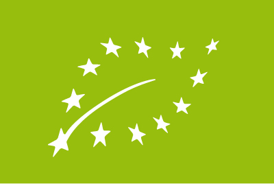 Logo che viene applicato in etichetta ai vini biologici certificati